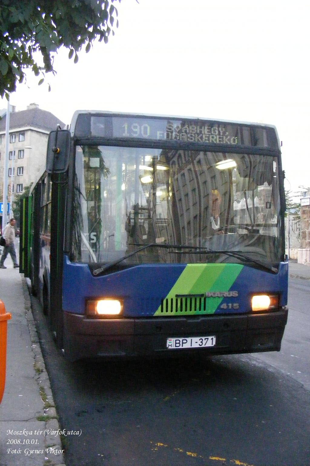 190-es busz a Moszkva téren